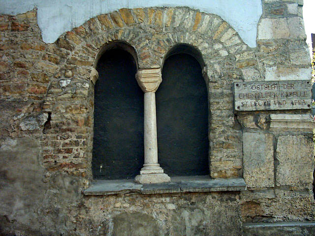 Regensburg (Bayern): Die Ostseite der ehemaligen romanischen Kapelle St. Georg und Afra Bildautor: Peter Bubenik - Aufnahmedatum: 27.04.2004 - Lizenz: GNU-FDL Dom Mehr Bilder aus Regensburg: Ein Abend an der Donau bei der Steinernen Brücke... Dom St. Peter (1) Als in Regensburg noch Straßenbahnen fuhren - Modell des Arnulfsplatzes um ca. 1960 Die Kaiserherberge am Haidplatz Meditieren auf Rengschburgerisch: Der Spitalgarten in Stadtamhof an der Steinernen Brücke Das Wohnhaus des Astronomen Johannes Kepler und seiner Familie von 1626-1628 Denkmal des Don Juan d'Austria, Sieger in der Seeschlacht von Lepanto Der Goldene Turm Die Neugestaltung des Neupfarrplatzes Mitte der 90er-Jahre fand nicht nur ungeteilte Zustimmung... Der Brückturm neben dem Salzstadel (2) Die historische Wurstküche ("Wurstkuchl") am Marc-Aurel-Ufer Das Ostentor Das "Bruckmandl" (Brückenmännlein) in der Mitte der Steinernen Brücke Zeugl (bair. für "Aushängeschild") des historischen Lokals "Zum Walfisch" Regensburg (Bayern): Der Biergarten im Bischofshof neben dem Dom (2) Gedenktafel für Oskar Schindler, der nach dem Krieg in Regensburg wohnte Sitzung des Immerwährenden Reichstags in Regensburg im Jahr 1640